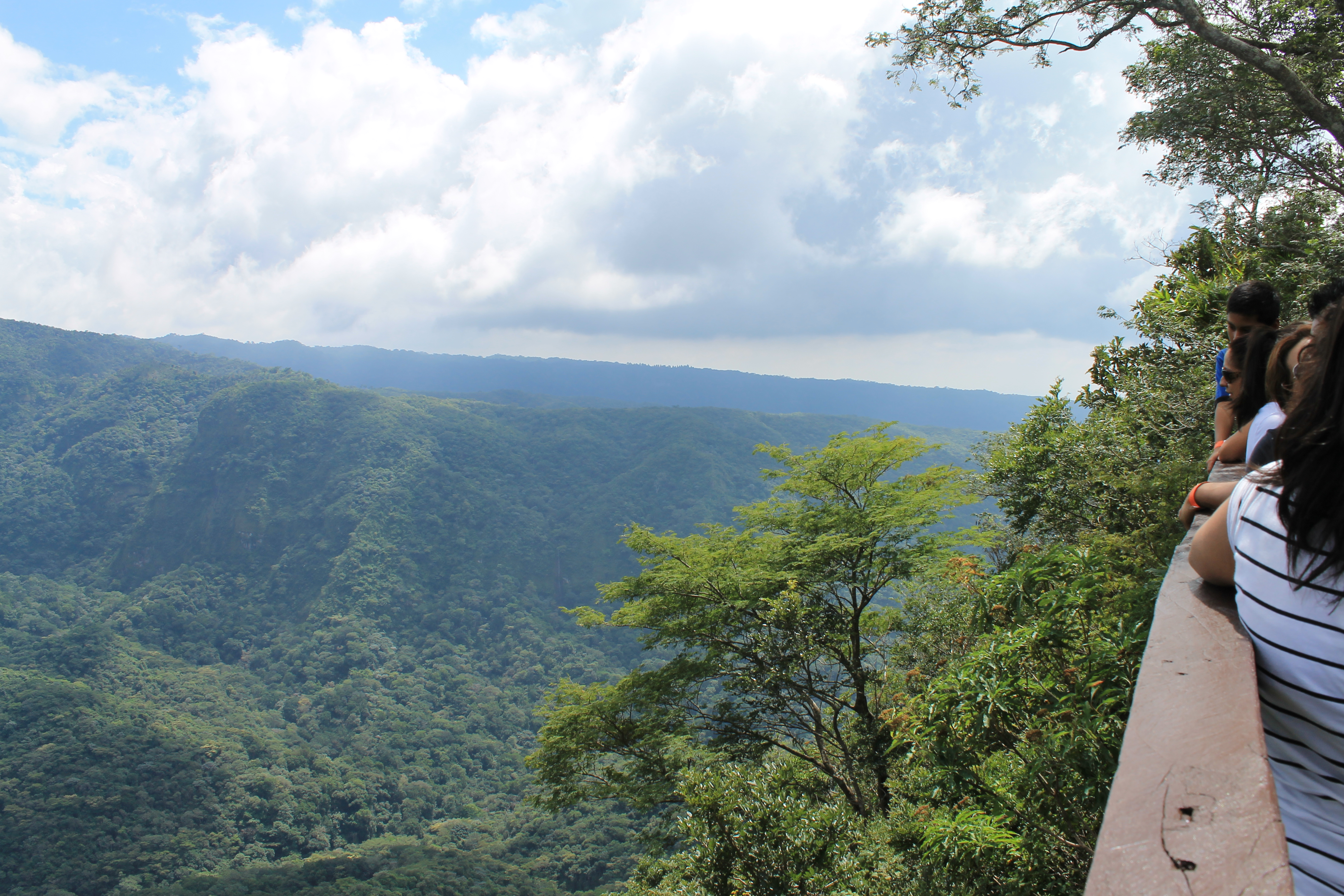 Vista desde un mirador adentro de el Parque Nacional El Imposible.